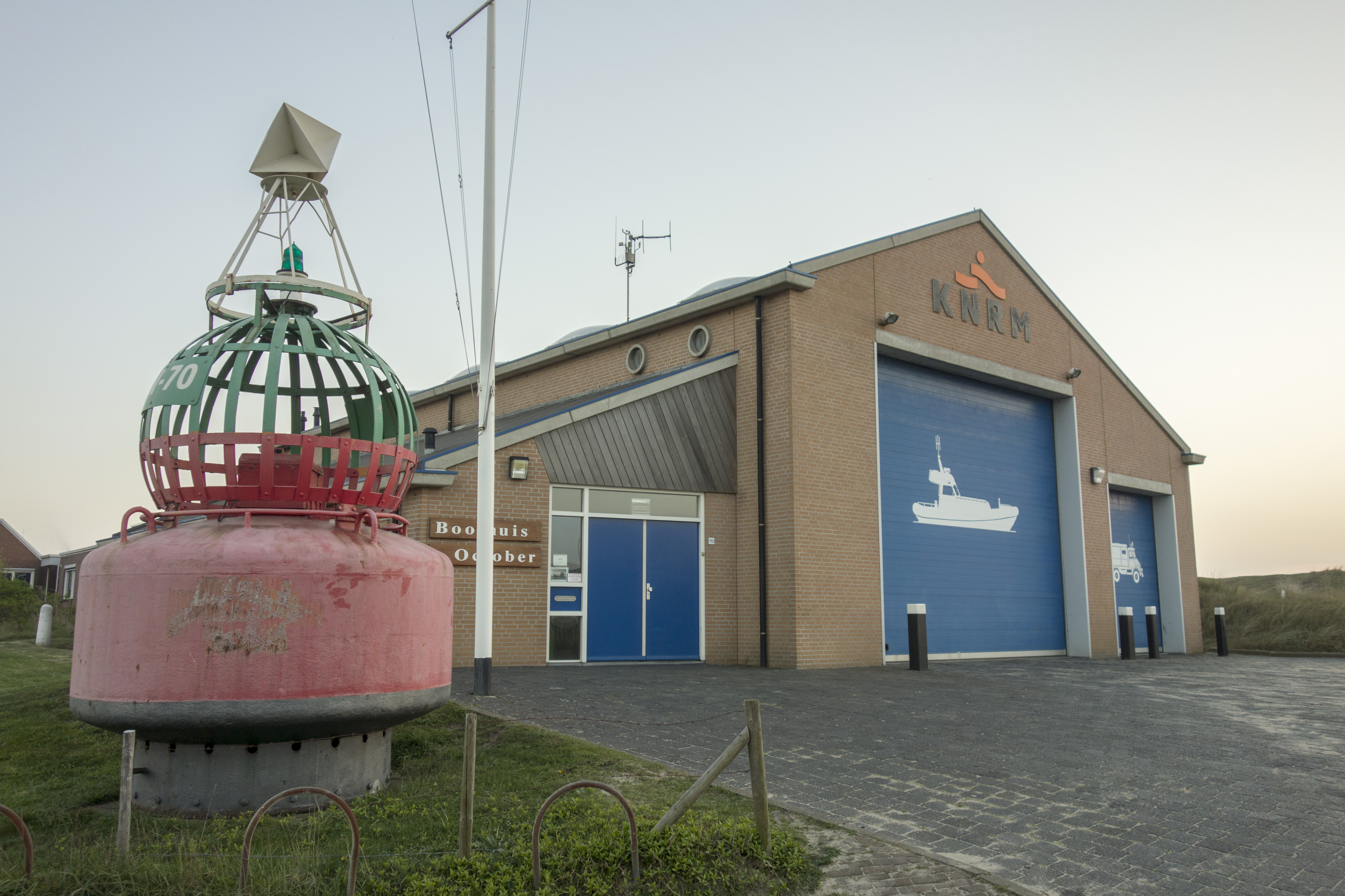 KNRM-station in Wijk aan Zee met ervoor een zeeboei.